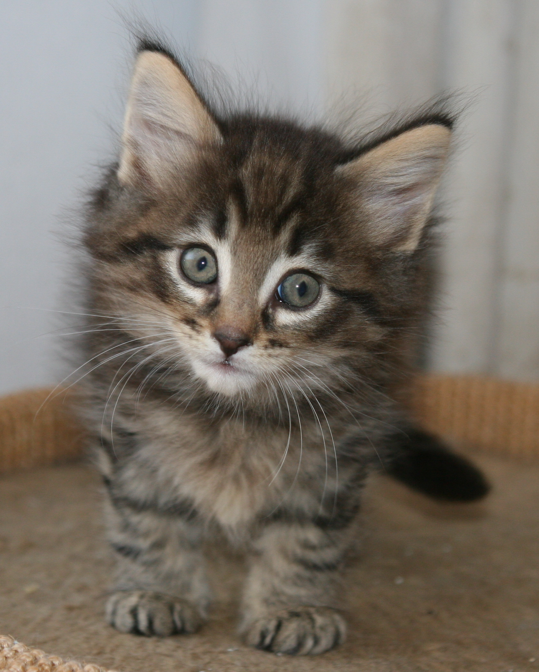 Koťátako